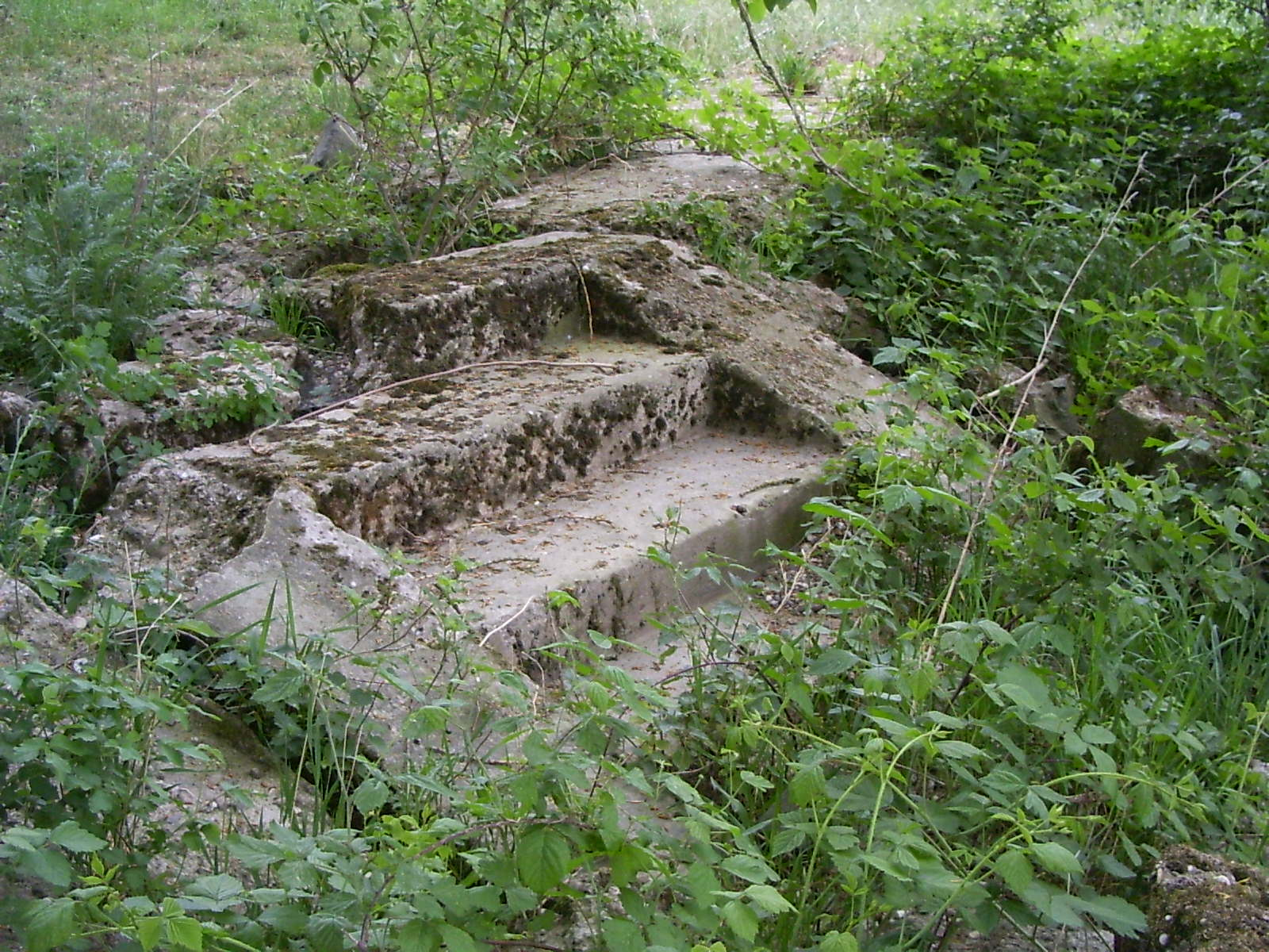 Treppe am Rhein bei der ehemalige Bahnfähre/Bahnbrücke Elten-Griethausen im NSG Emmericher Ward